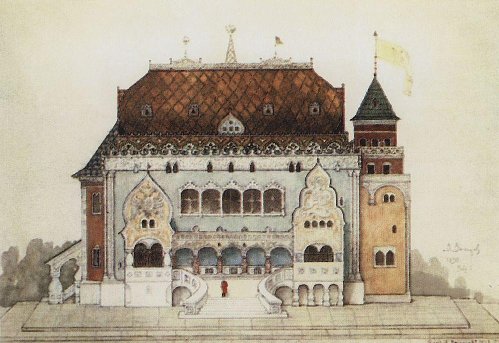 Проект русского павильона на Парижской выставке